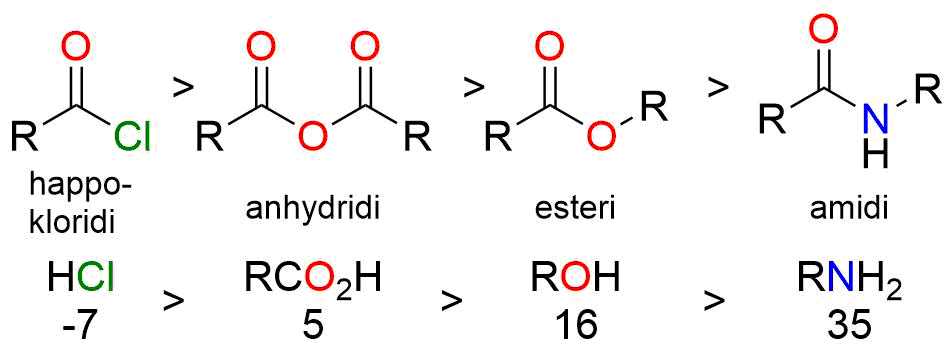 Karboksyylihappojohdosten reaktiivisuus riippuu lähtevän ryhmän (L-) konjugaattihapon (HL) pKa-arvosta.